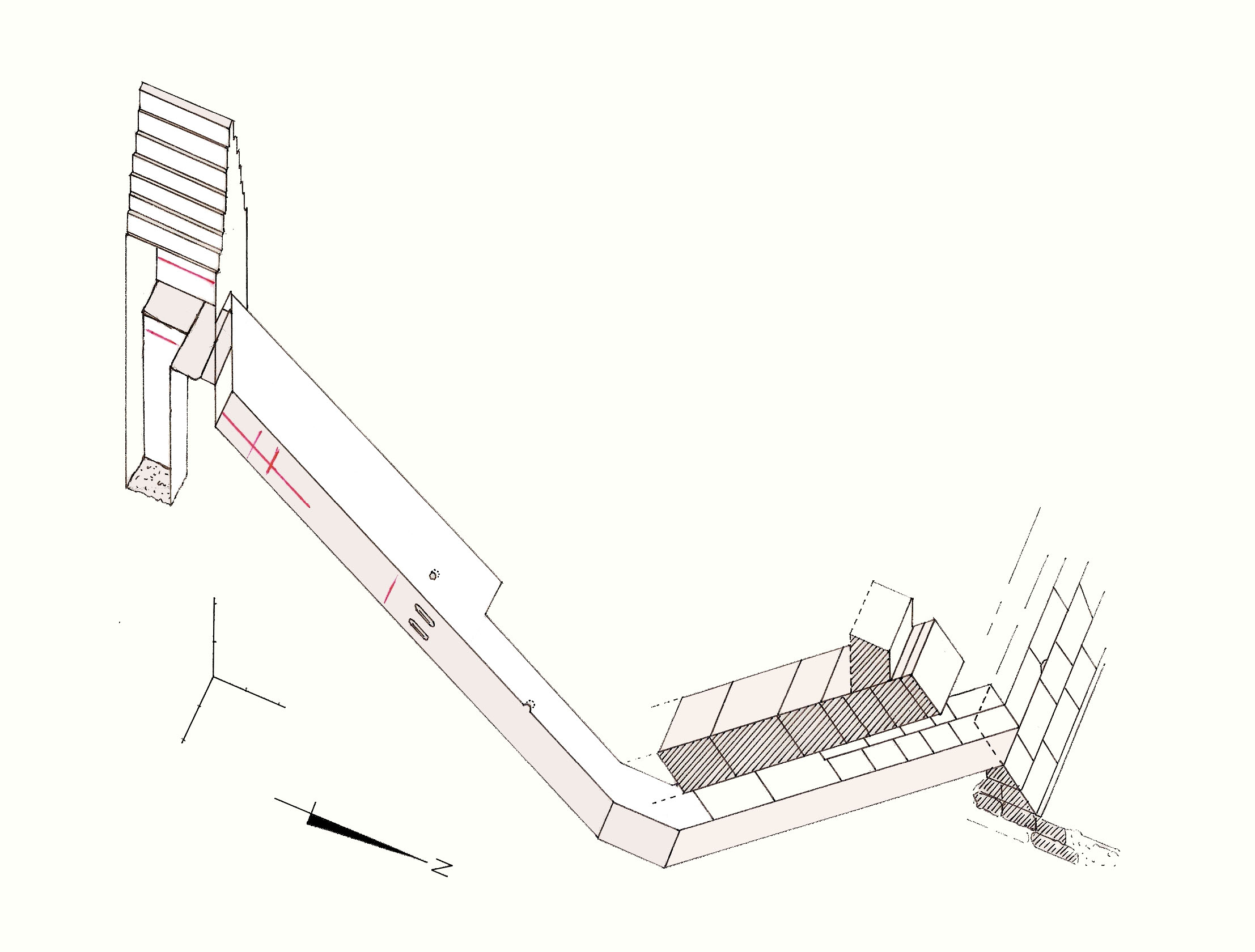 Vue axonométrique des appartements funéraires de la pyramide satellite de Snéfrou à Dahchour sud.